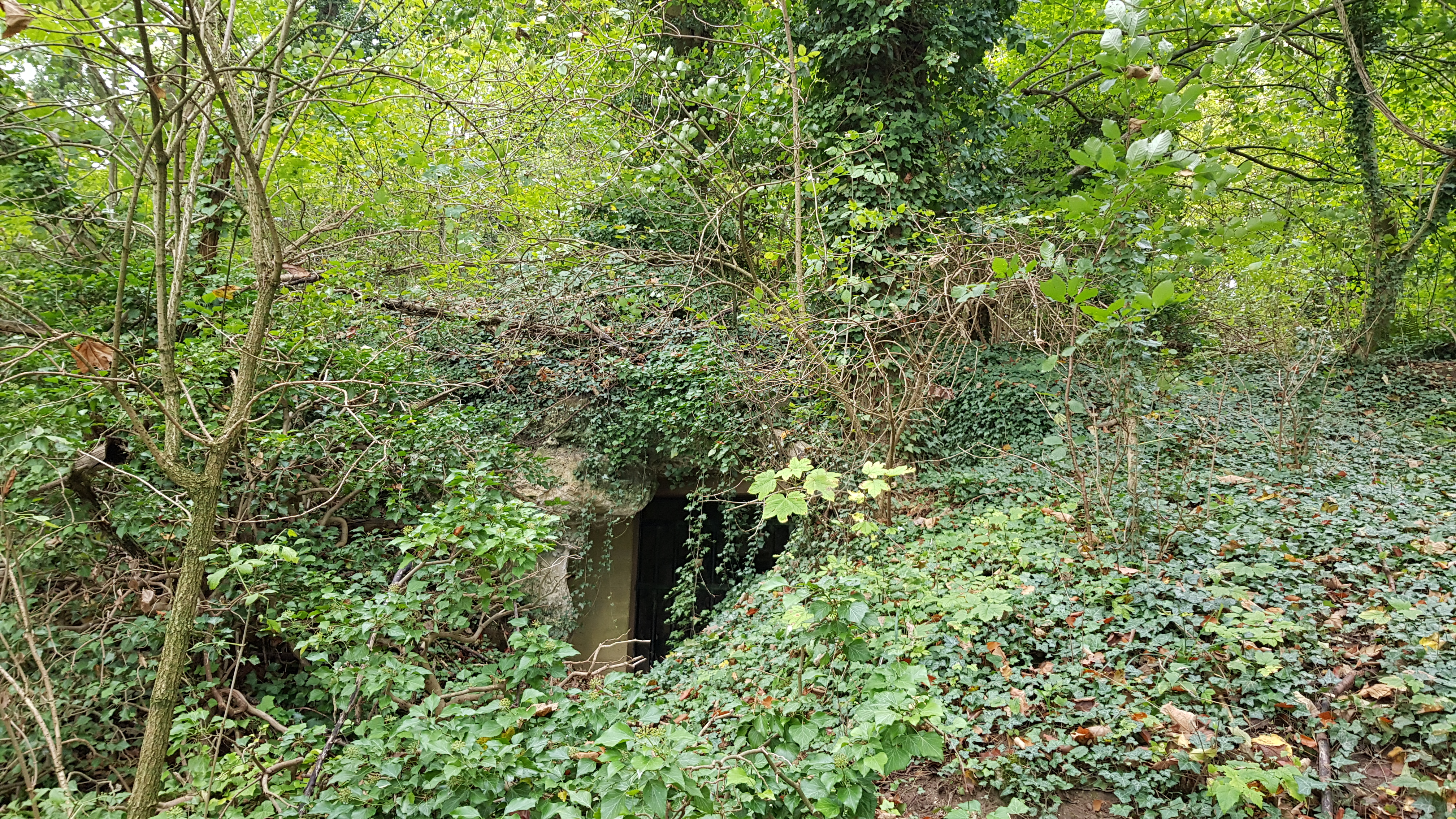 Sint-Jansboschgroeve V, Oud-Valkenburg, Nederland